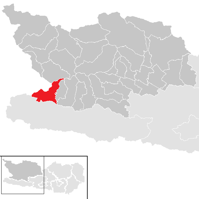 Bezirk Spittal an der Drau